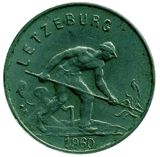 1 franc Luxembourg grande duchesse Charlotte émis en 1960